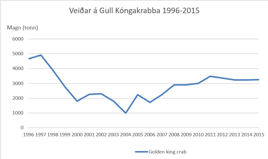 Veiðar á Gull kóngakrabba